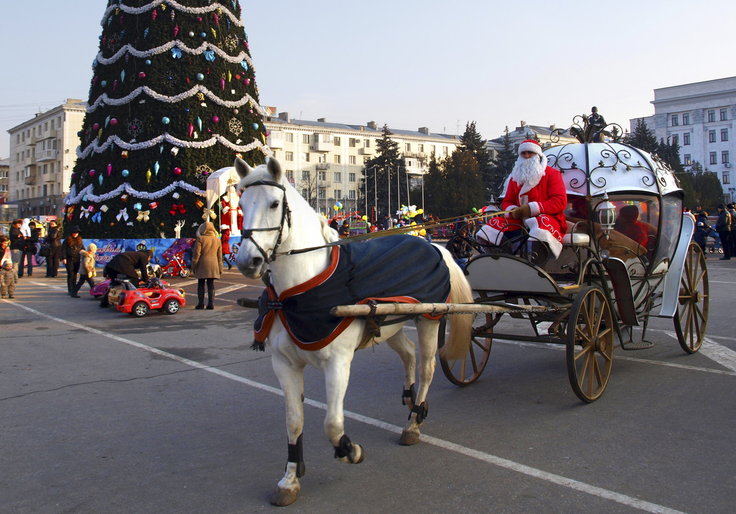 Дід Мороз: Own work